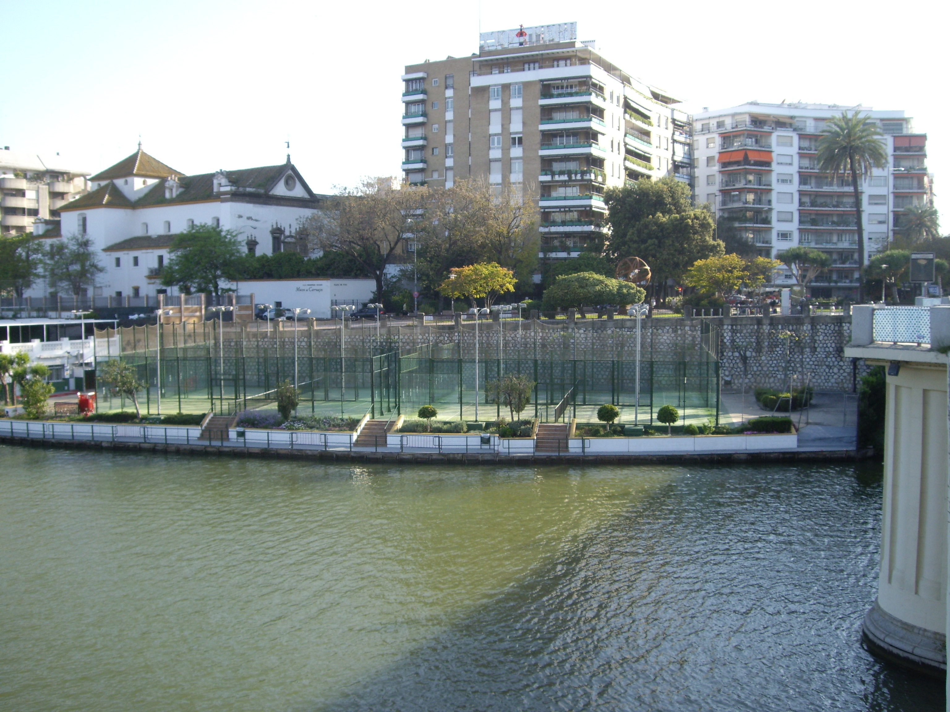 Muelle de las Mulas de Sevilla. Desde donde partieron Magallanes y Juan Sebastián Elcano en 1519.